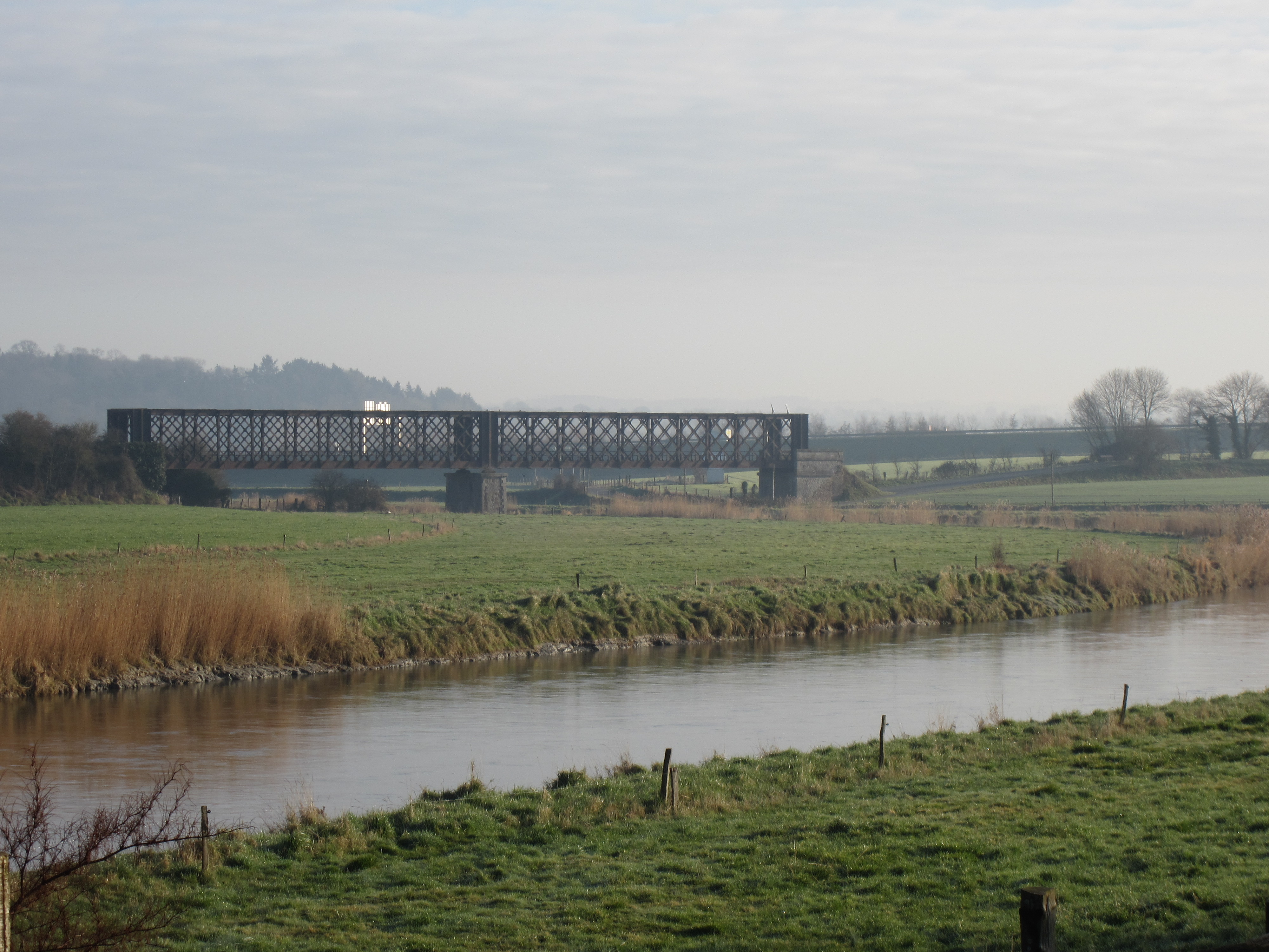 Pontaubault